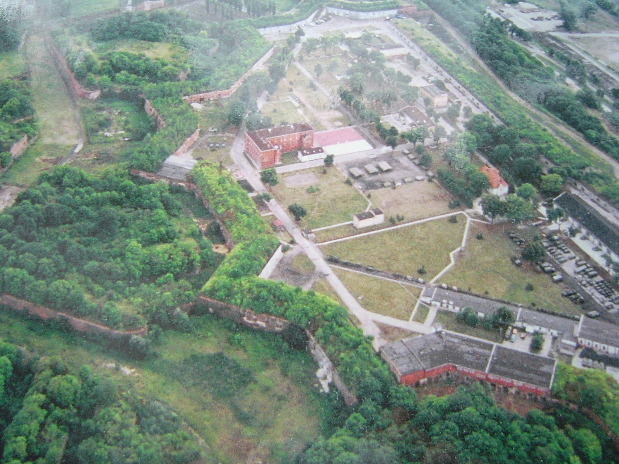 Grudziądz - cytadela z lotu ptaka (zabytek nr 597)